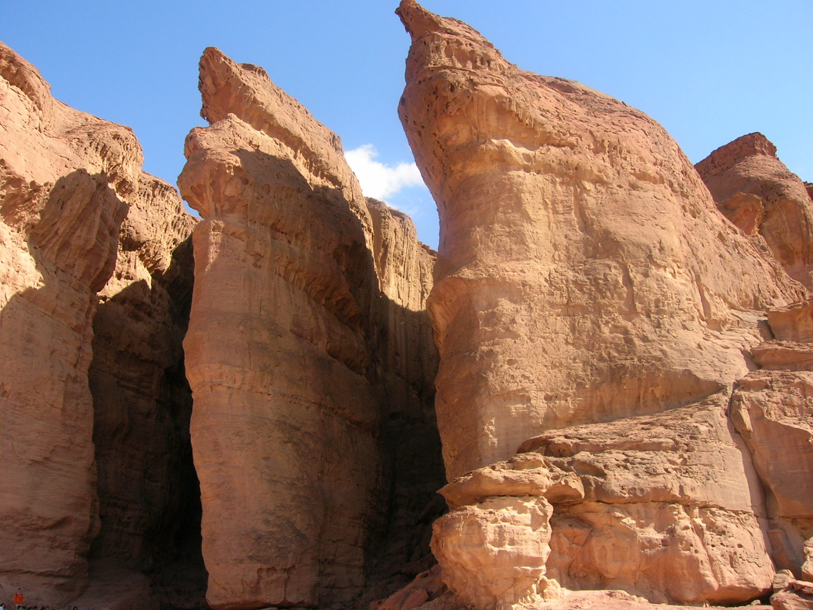 Timna Park, Negev, Israel